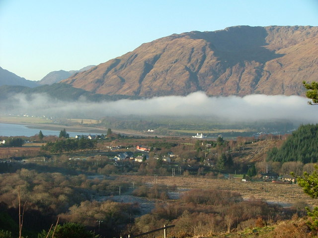 Inchree Hamlet